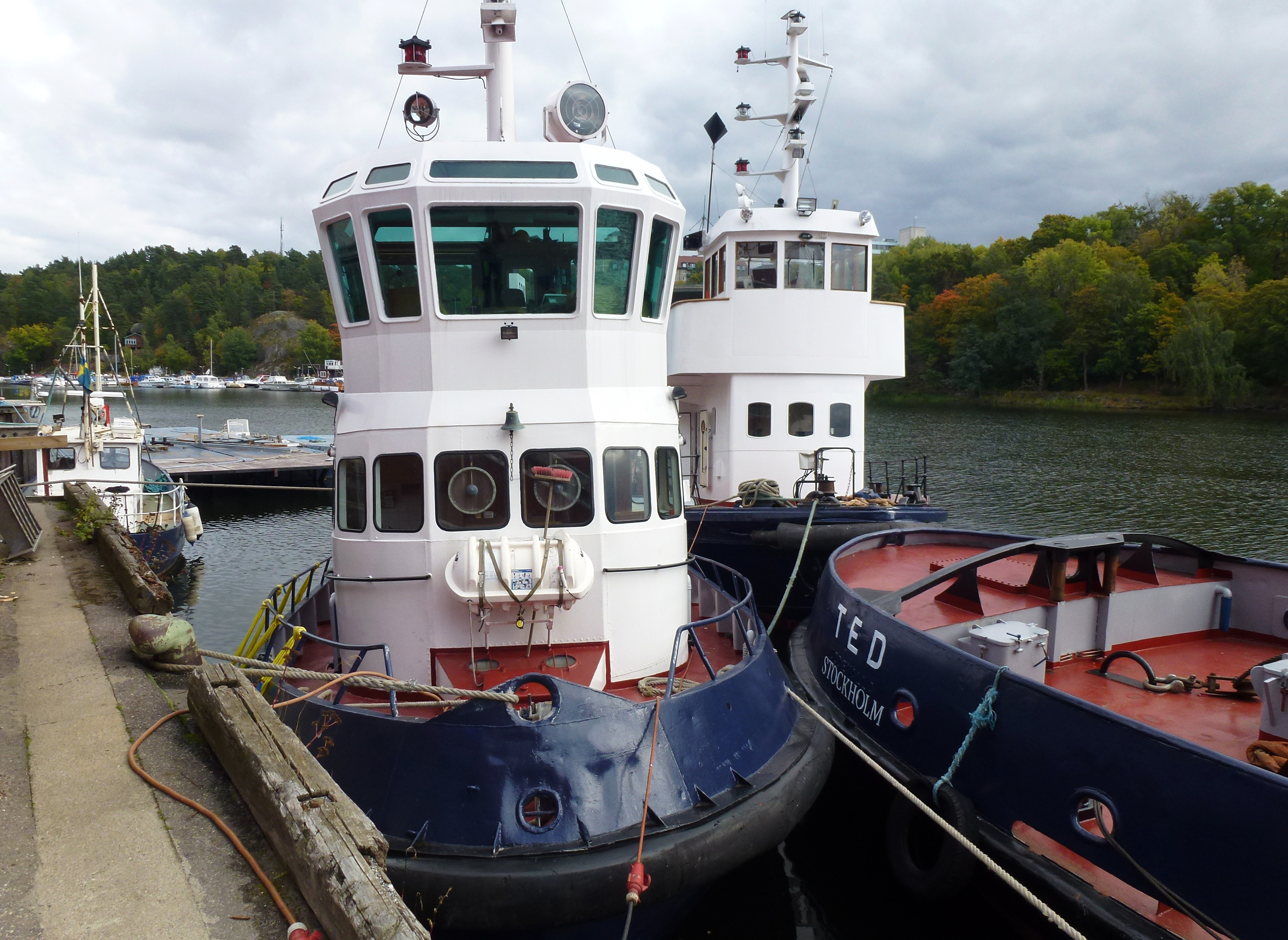 Bågserbåtarna TOM, TED och LEIF i Gäddviken